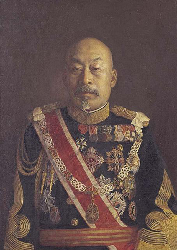 Portrait of Masatake Terauchi (1852-1919)